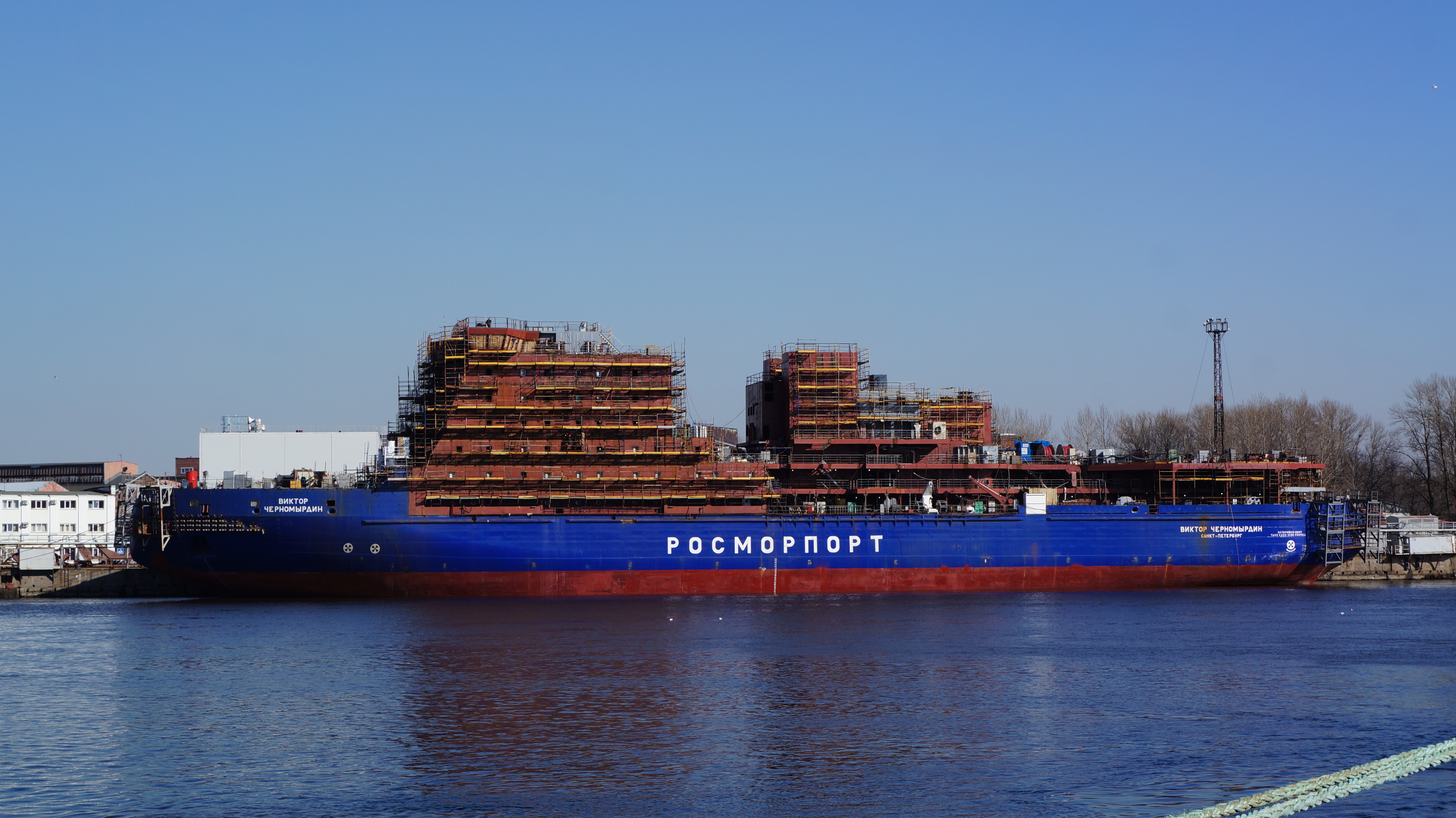 Ледокол «Виктор Черномырдин» в процессе сборки